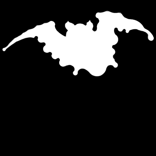 「蝙蝠」紋（染抜）